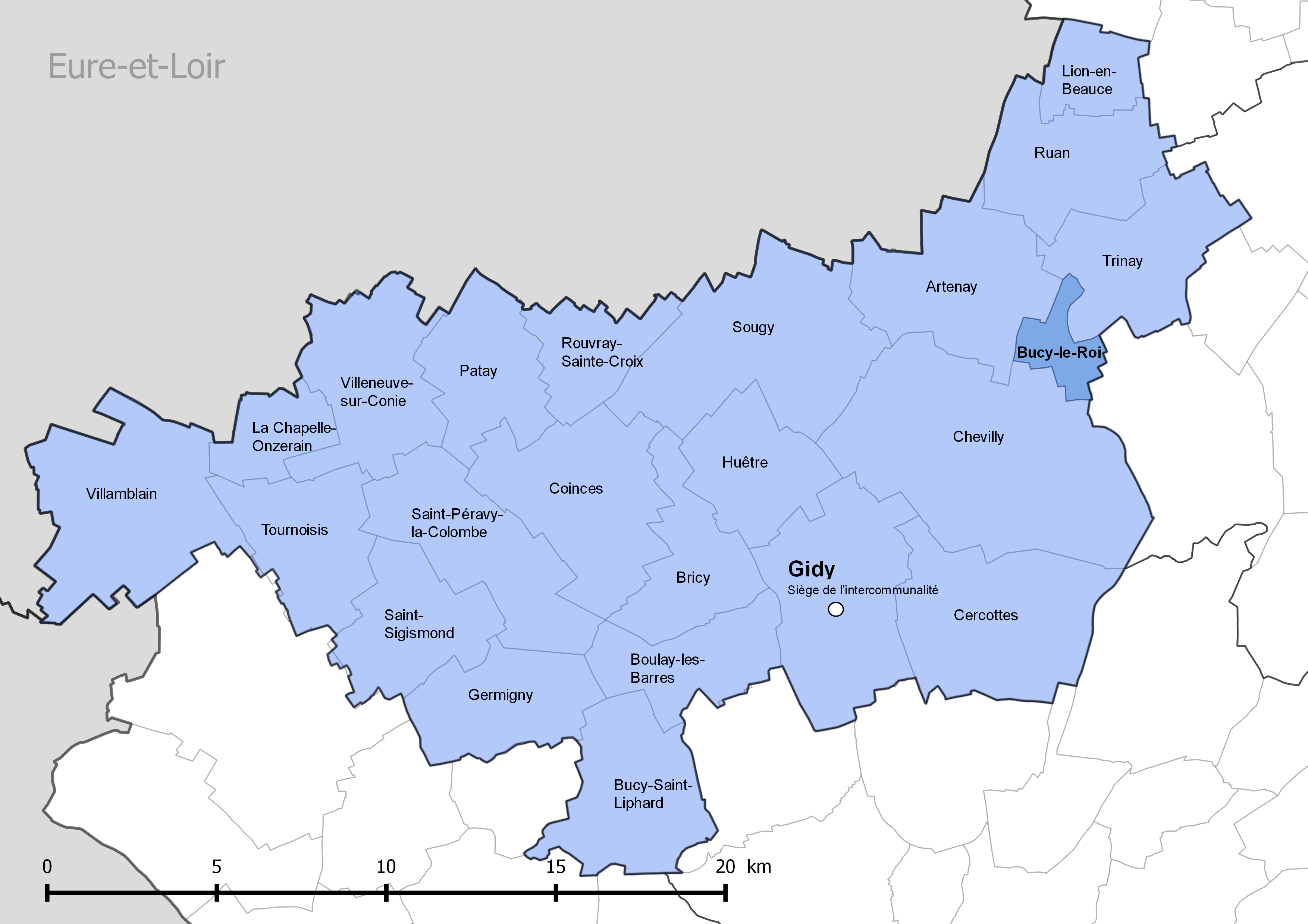 Périmètre de la communauté de communes de la Beauce loirétaine - Situation de la commune de Bucy-le-Roi